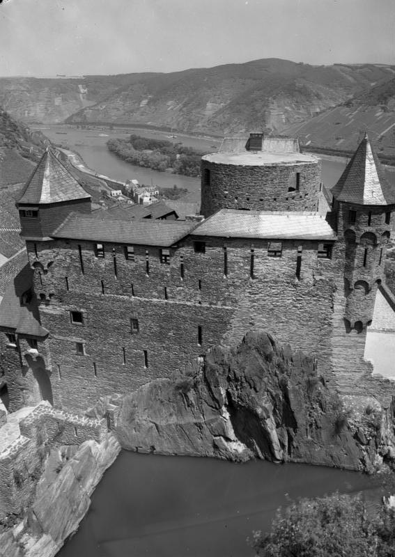 Burg Stahleck bei Bacharach